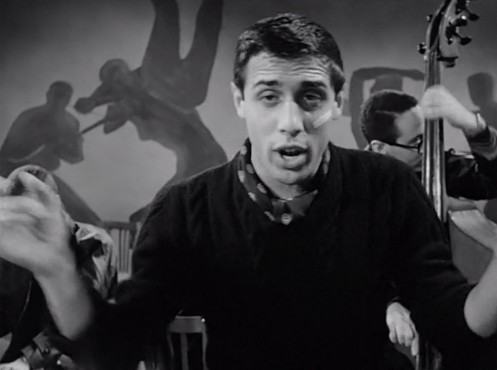 frame dal film I ragazzi del juke-box (1959)